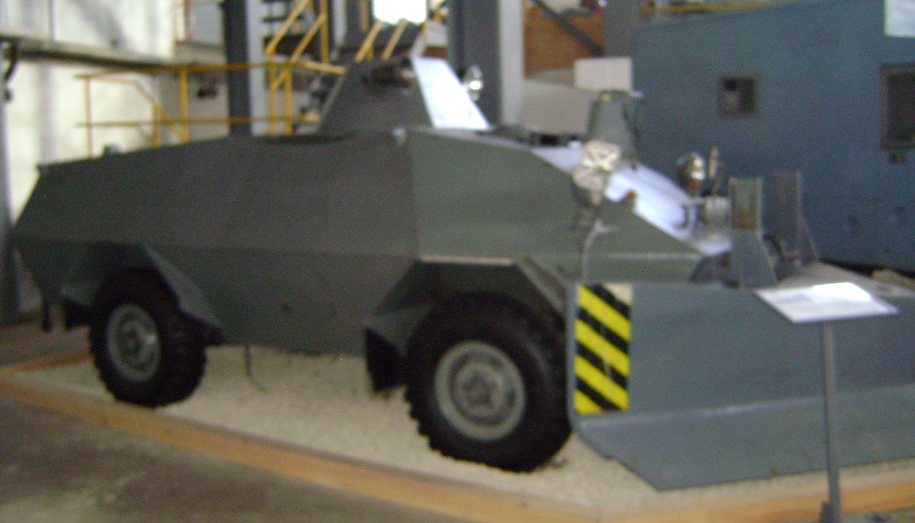 MOWAG Roland Polizei seite